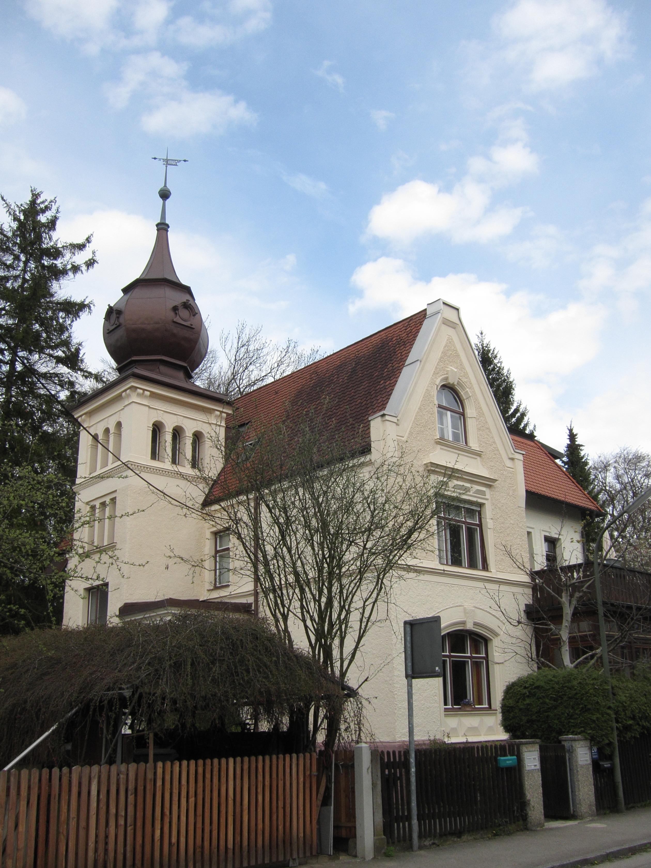 Wehnerstraße 20; Villa, mit Turm und Fachwerk, 1899 von Louis Ende.